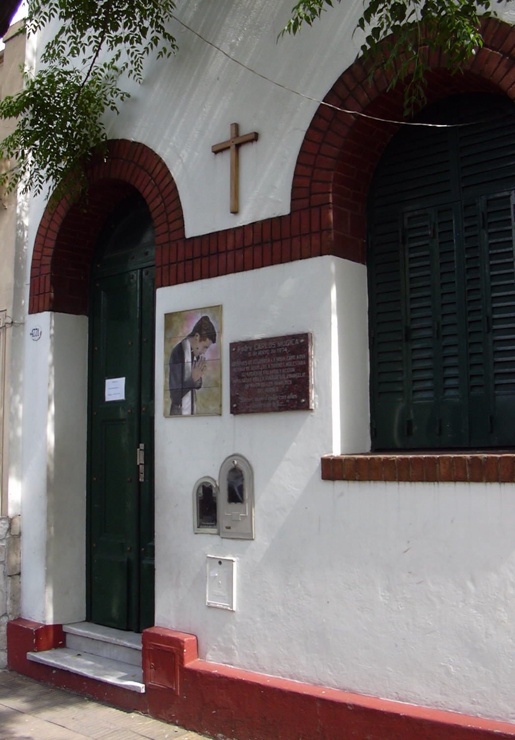 Parroquia San Francisco Solano, de la calle Zelada 4771 (Villa Luro) - Placa conmemorativa del asesinato del sacerdote Carlos Mugica en 1974